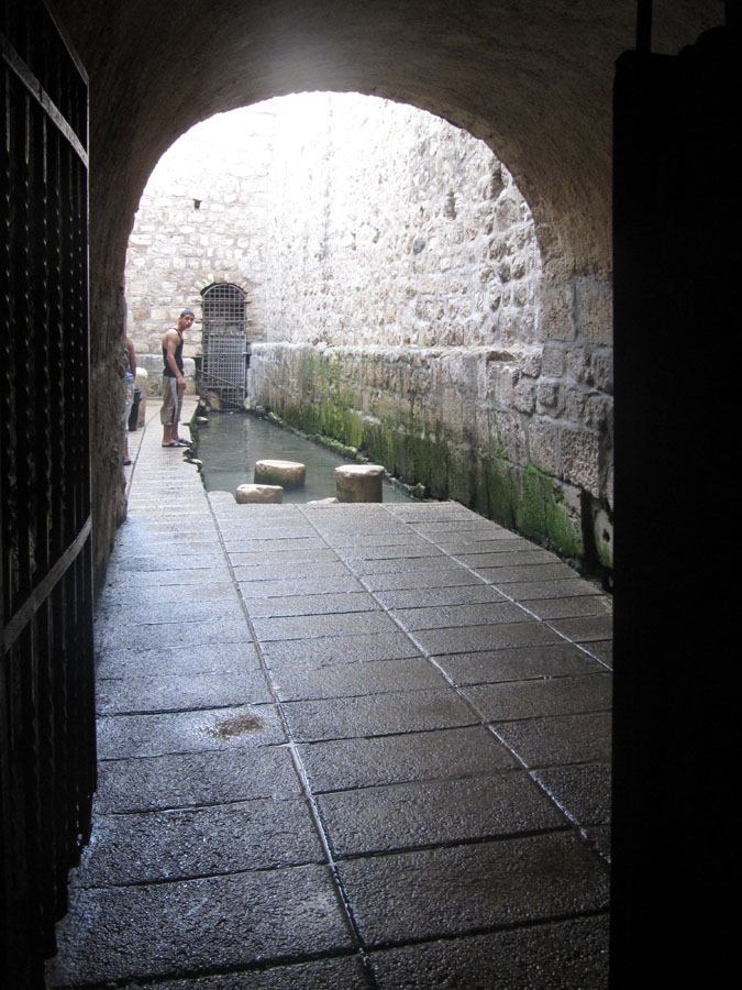 Byzantine Pool of Siloam בריכת השילוח הביזנטית